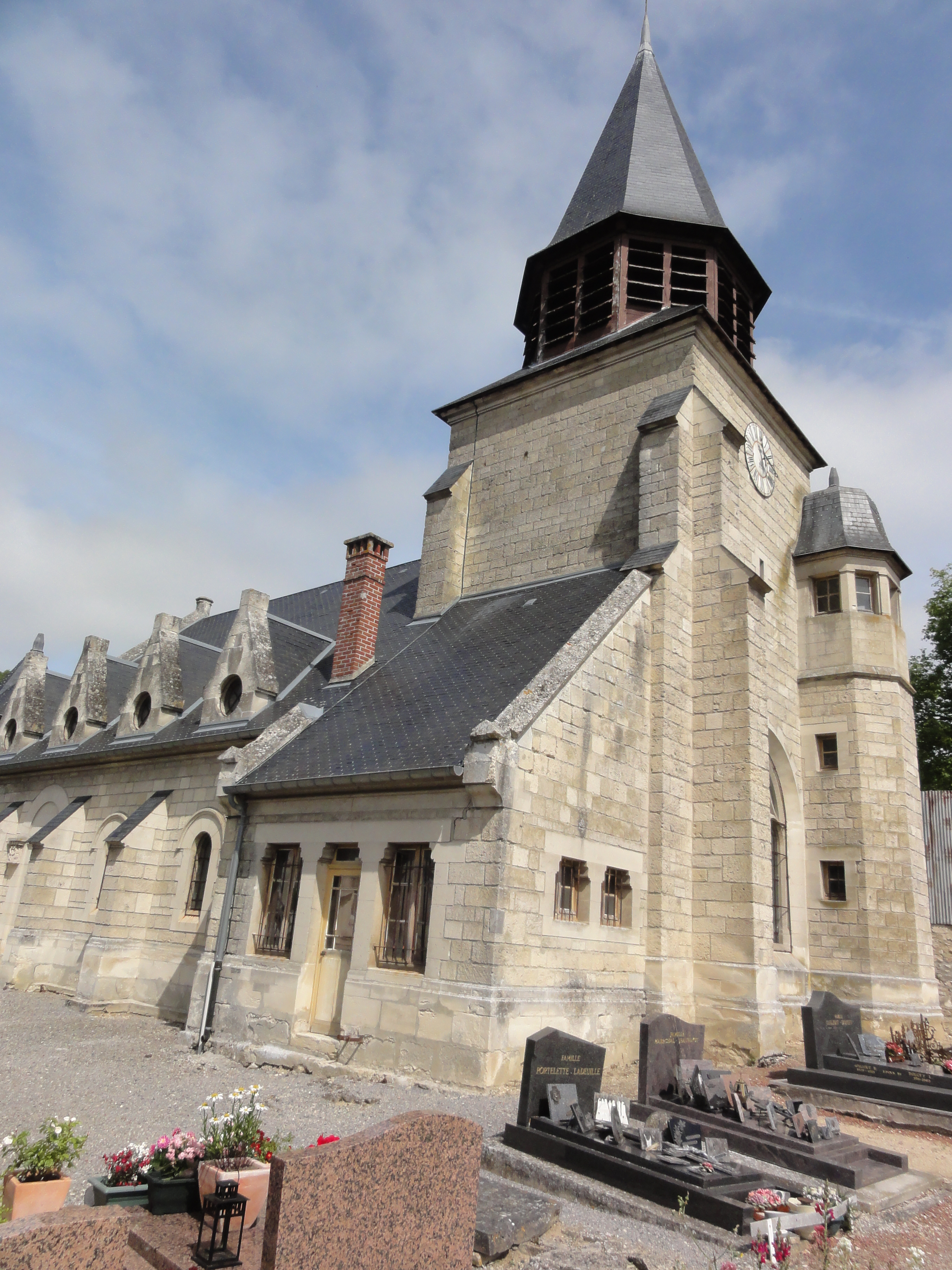 Jumigny (Aisne) église